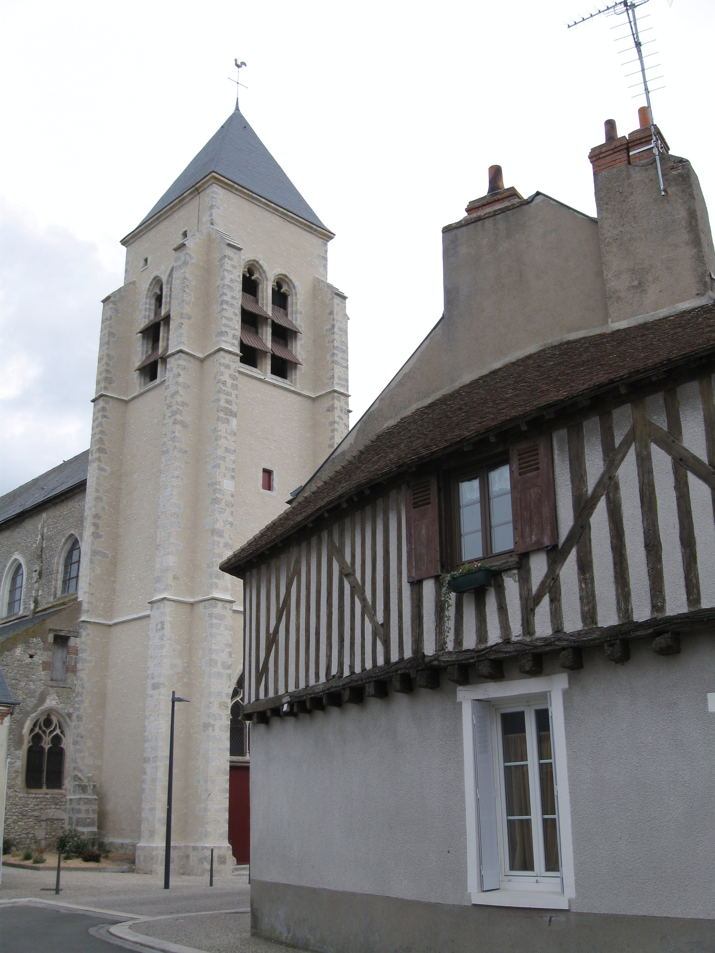 Église Saint-Loup, Ingré, Loiret, France